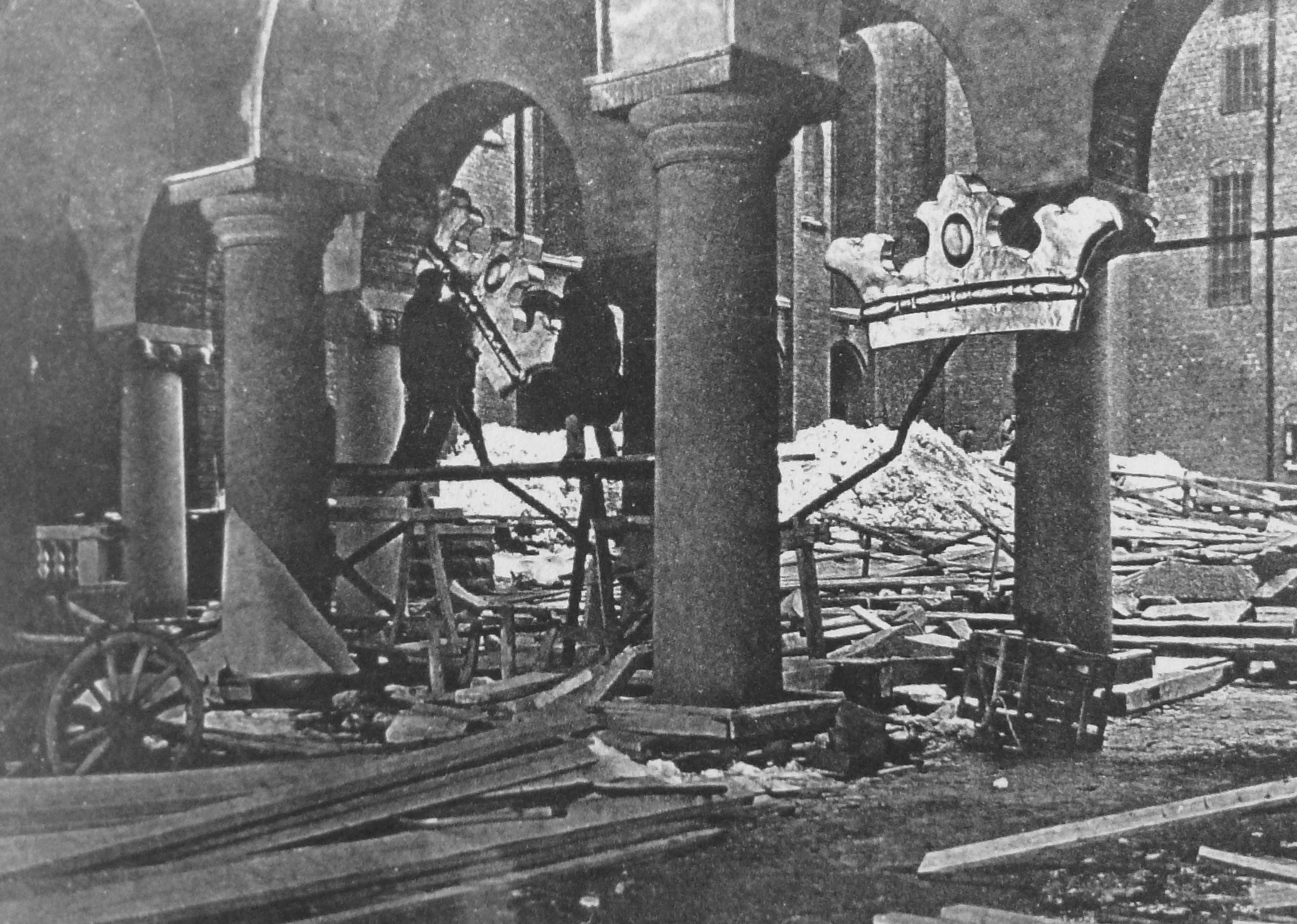 Stockholms stadshus tornspiran på borgargården